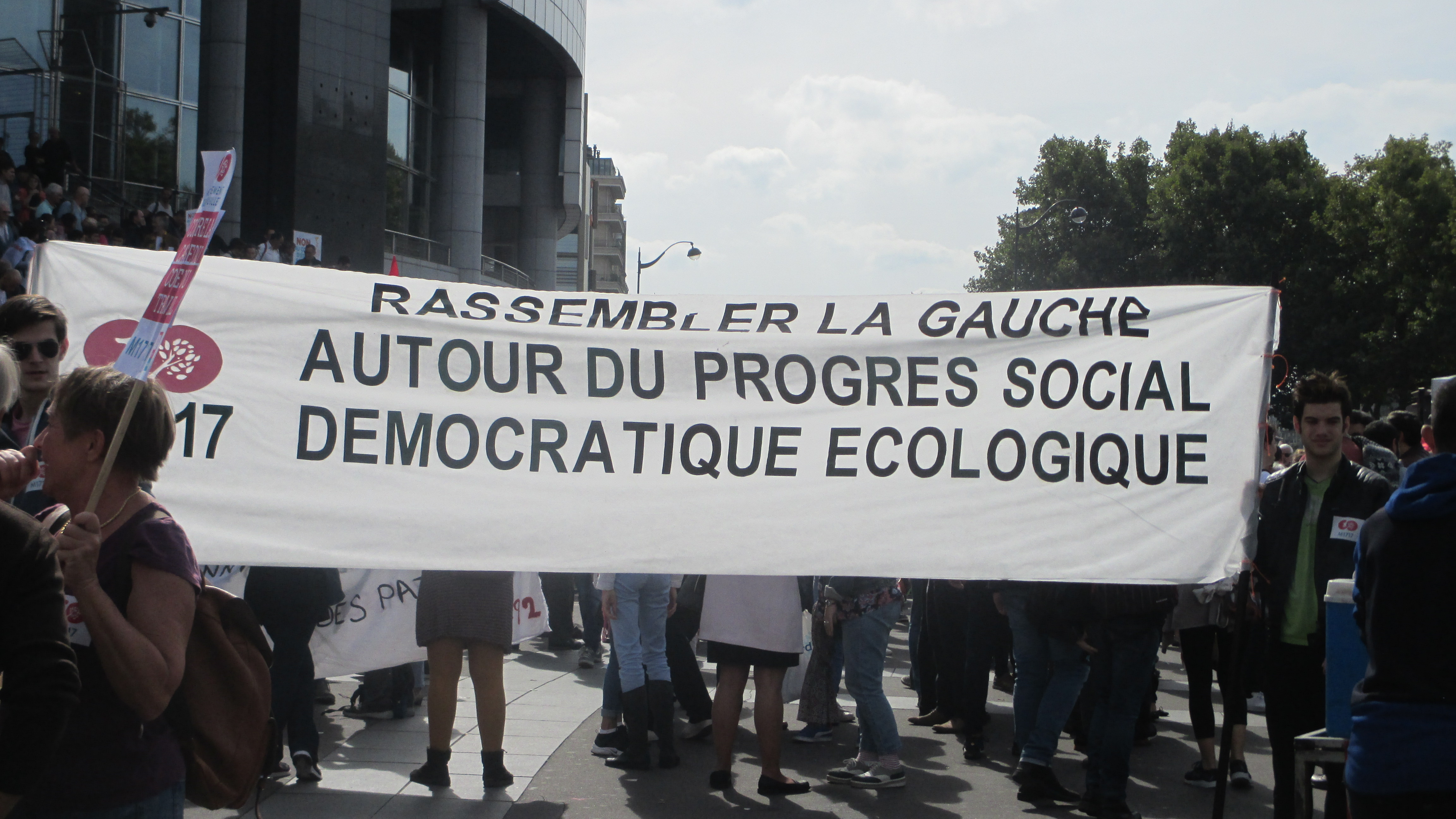 Militants du Mouvement du 1er Juillet à Bastille (Paris, France) lors de la marche du 23 septembre 2017 contre le Coup d'État social organisée par La France insoumise.